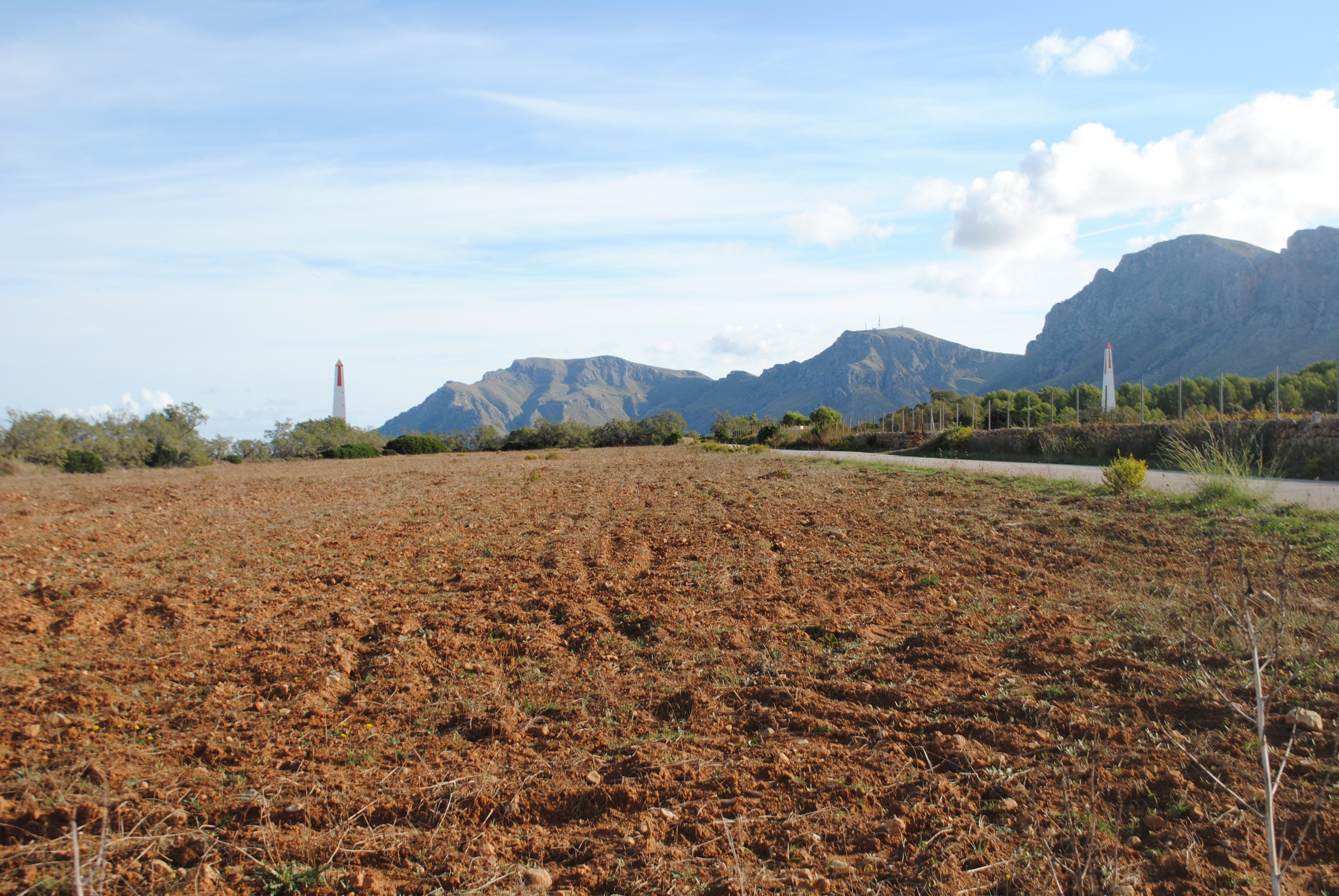 Camp llaurat prop des Saragall de sa Jonquera